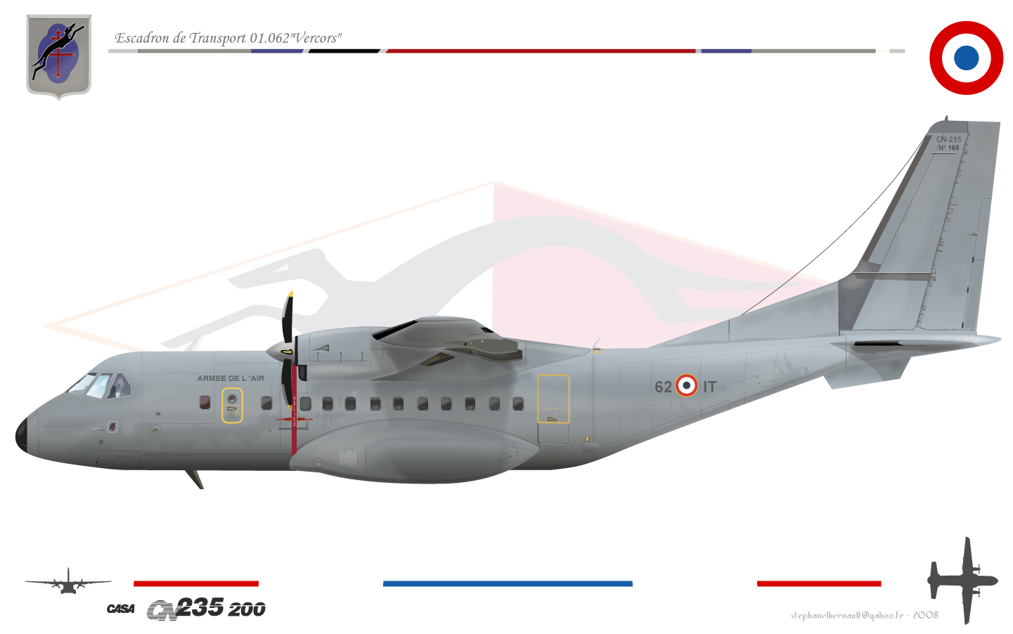 CASA CN 235 escadron 1/62 vercors armée de l'air FRANCE